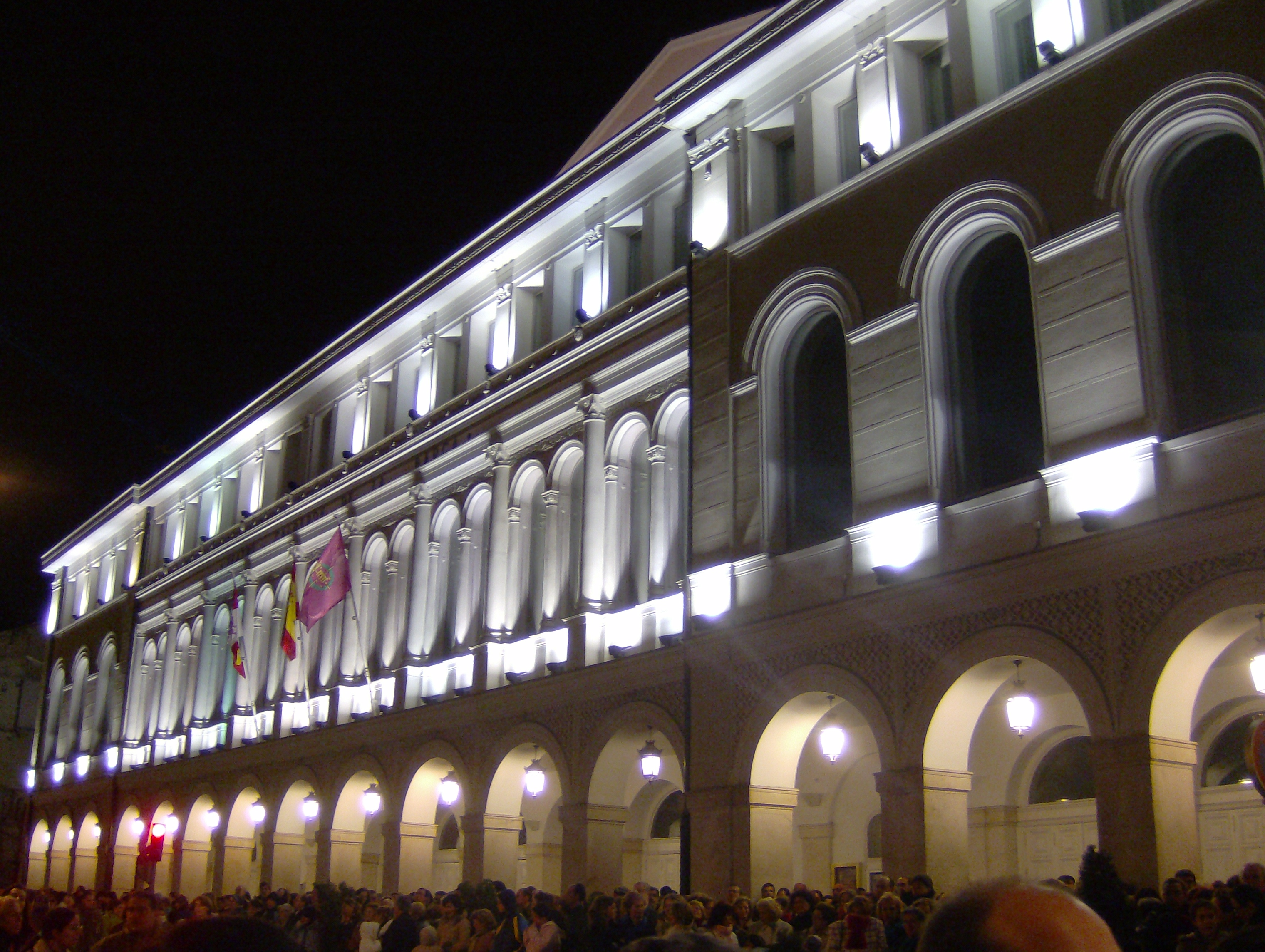 Teatro Calderón (Valladolid)